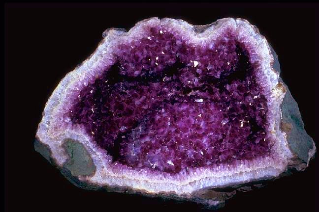 Ametyst Geode